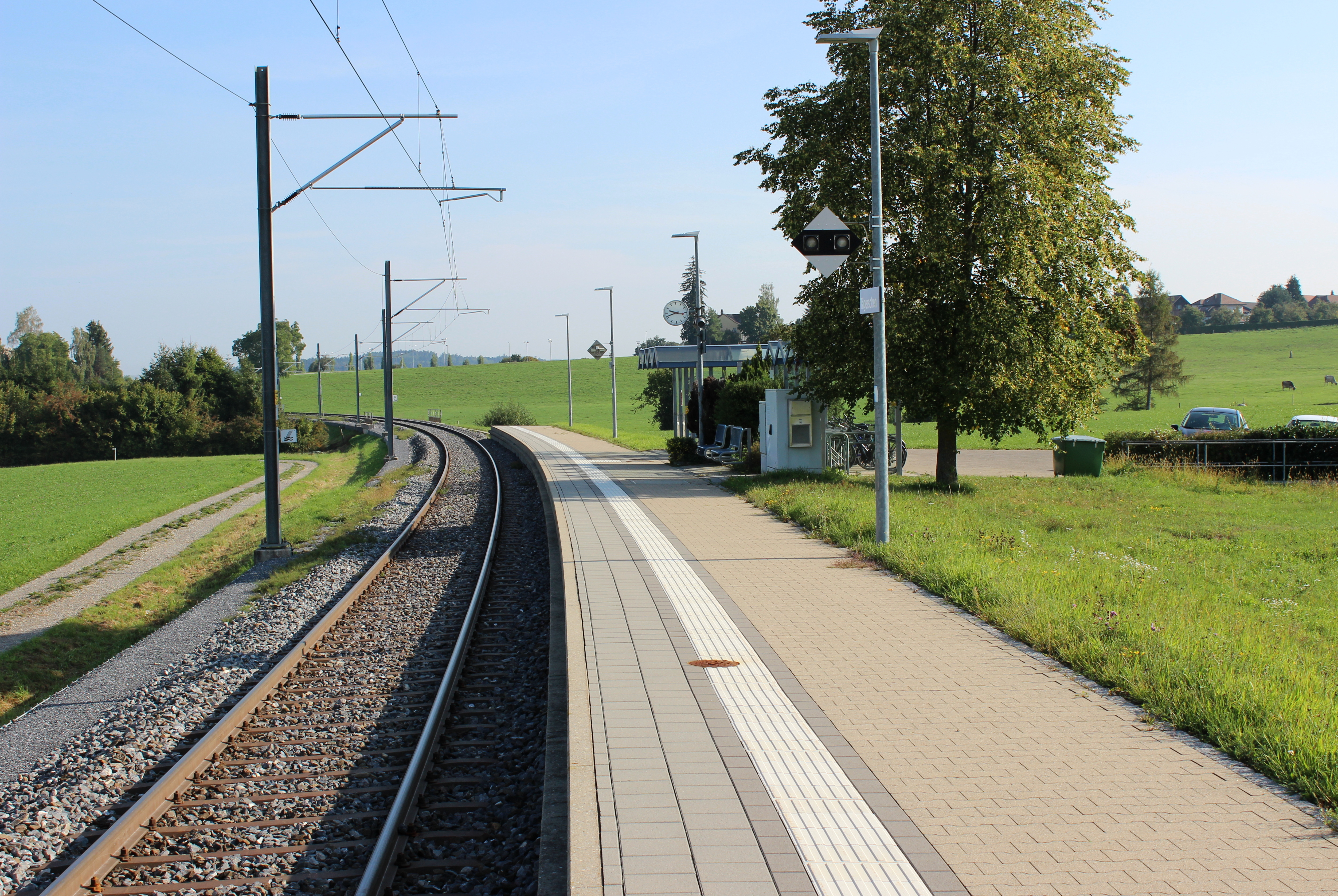 Bahnhof Tägerschen in Richtung Tobel